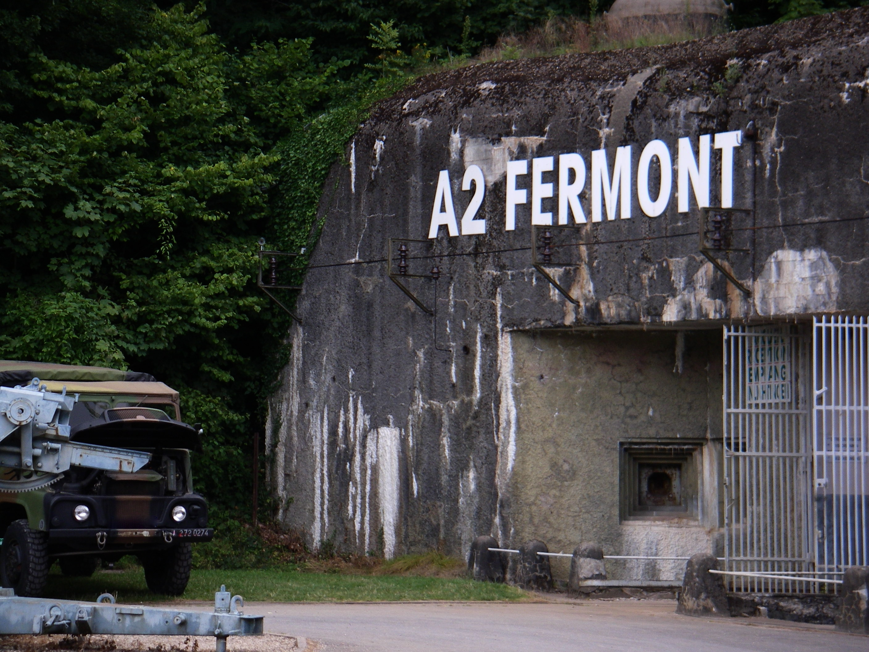 Le gros ouvrage du Fermont ; sur la commune de Montigny-sur-Chiers faisait partie du Secteur fortifié de la Crusnes de la Ligne Maginot.